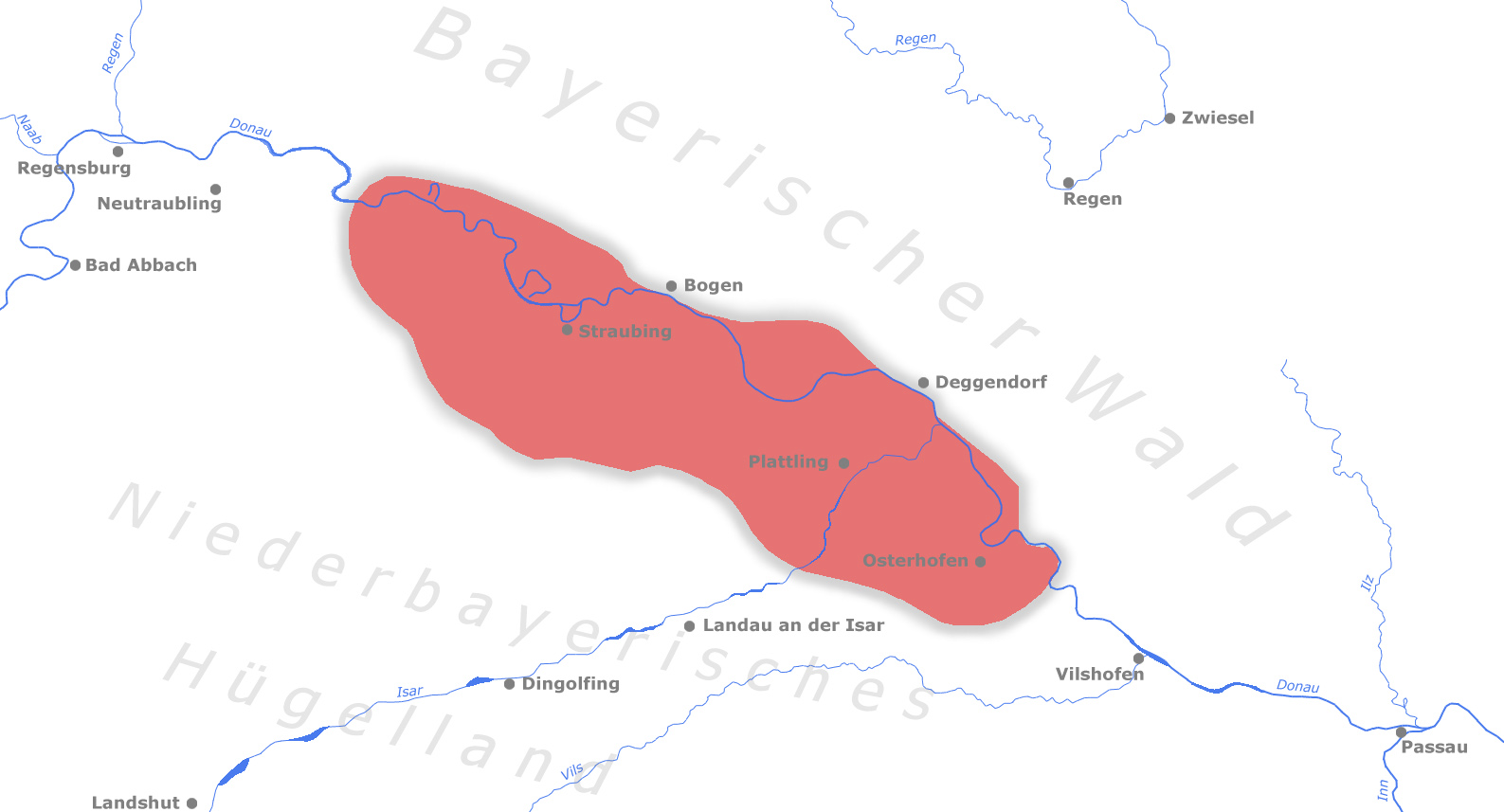 Karte des Gäubodens, ungefähre Ausdehnung